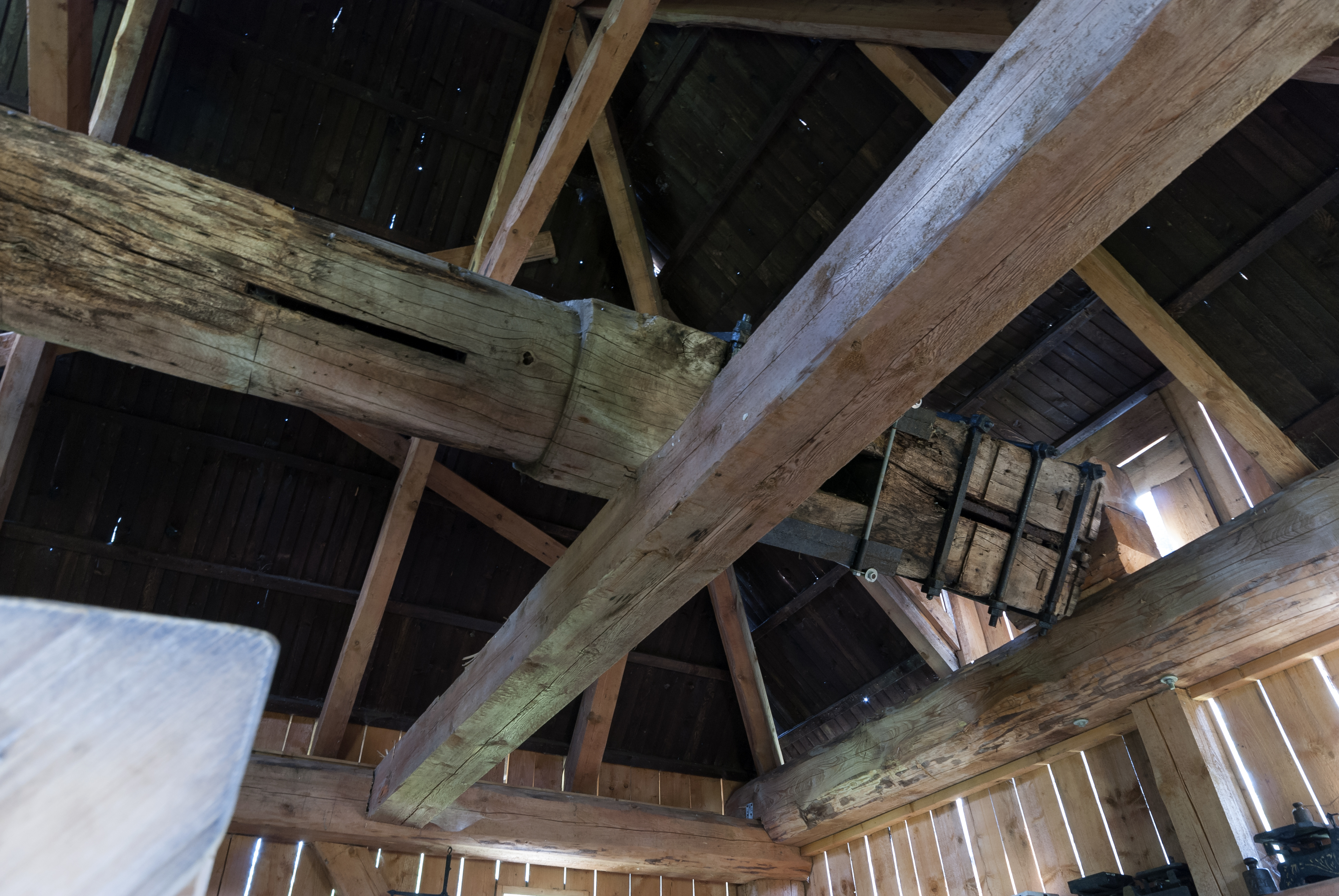 Kudowa-Zdrój - Pstrążna, wieś - układ przestrzenny, XVIII, XX